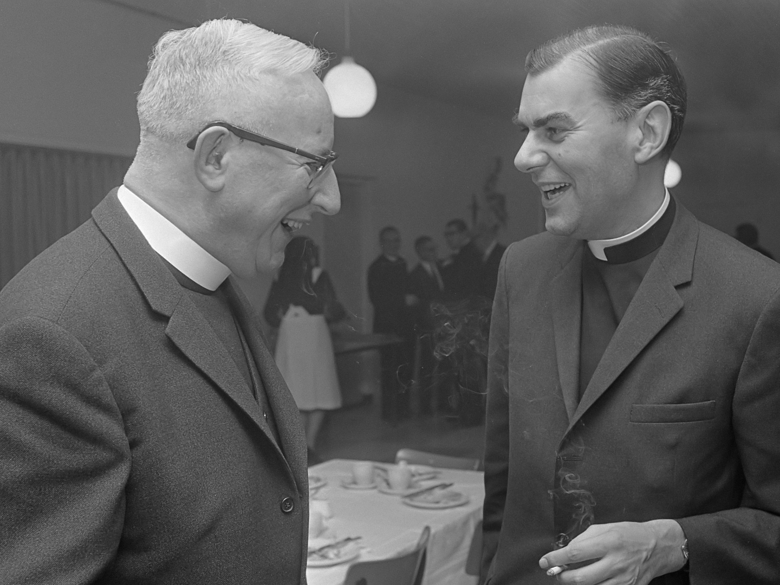 Besprekingen over de Encycliek Humanae Vitae te Noordwijkerhout (Pastoraal Concilie), Mgr. P.A. Nierman (links) in gesprek met Mgr. J. Bluyssen 27 oktober 1968